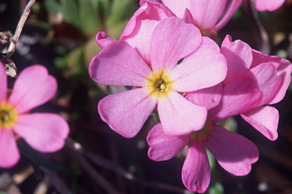 Androsace carnea, photo de utilisateur:cptcv, 10 mai 2003, Bious Artigues (64), France